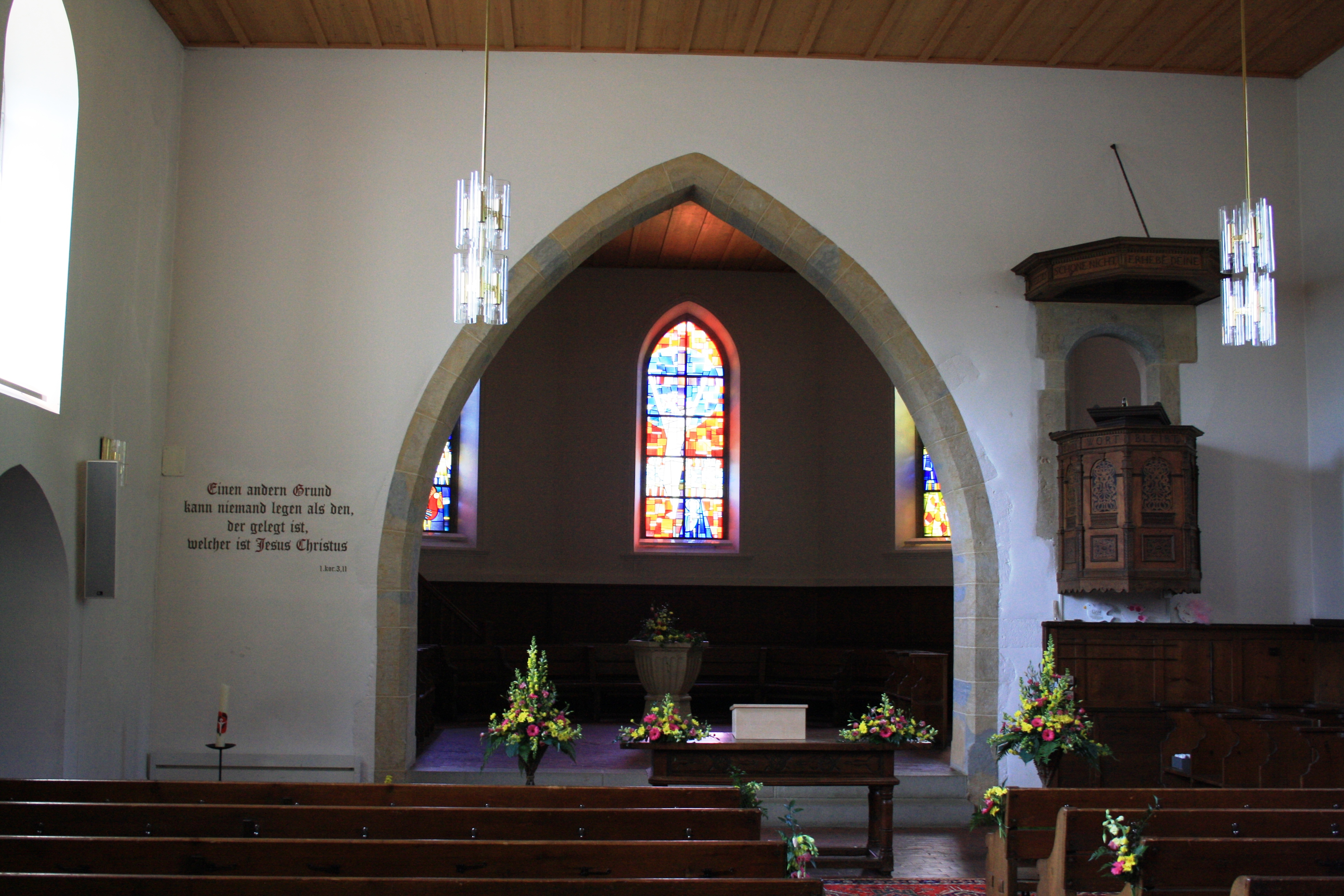 Schiff und Chor der reformierten Kirche Densbüren